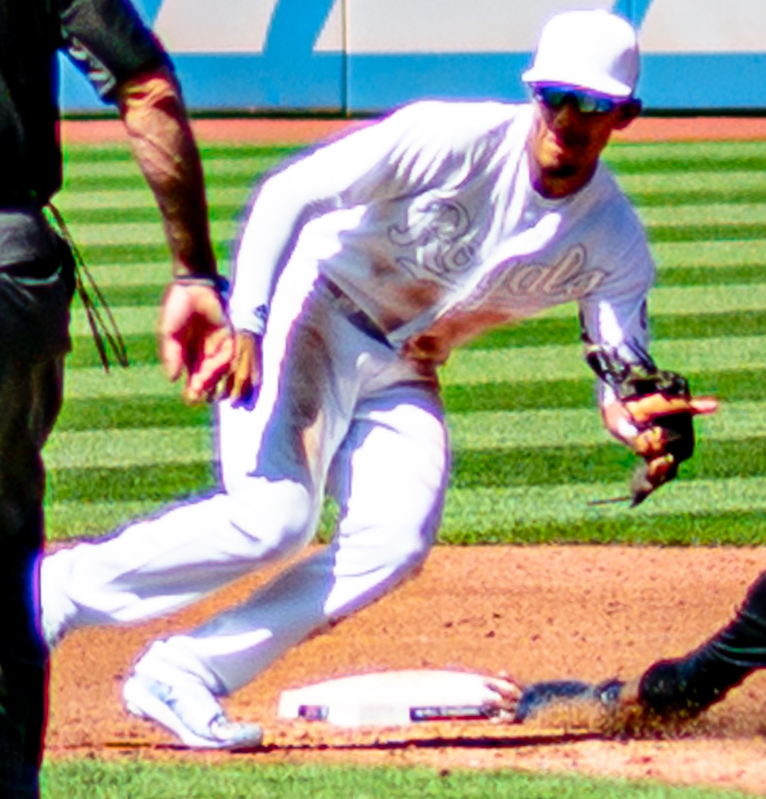 Kansas City Royals VS. Cleveland Indians